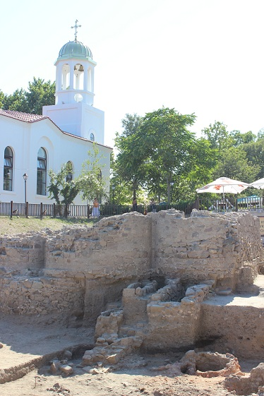 Die Heilige Brüder Kiril und Methodius-Kirche (1888) und die mittelalterliche, einschiffige Nikolaus-Kirche